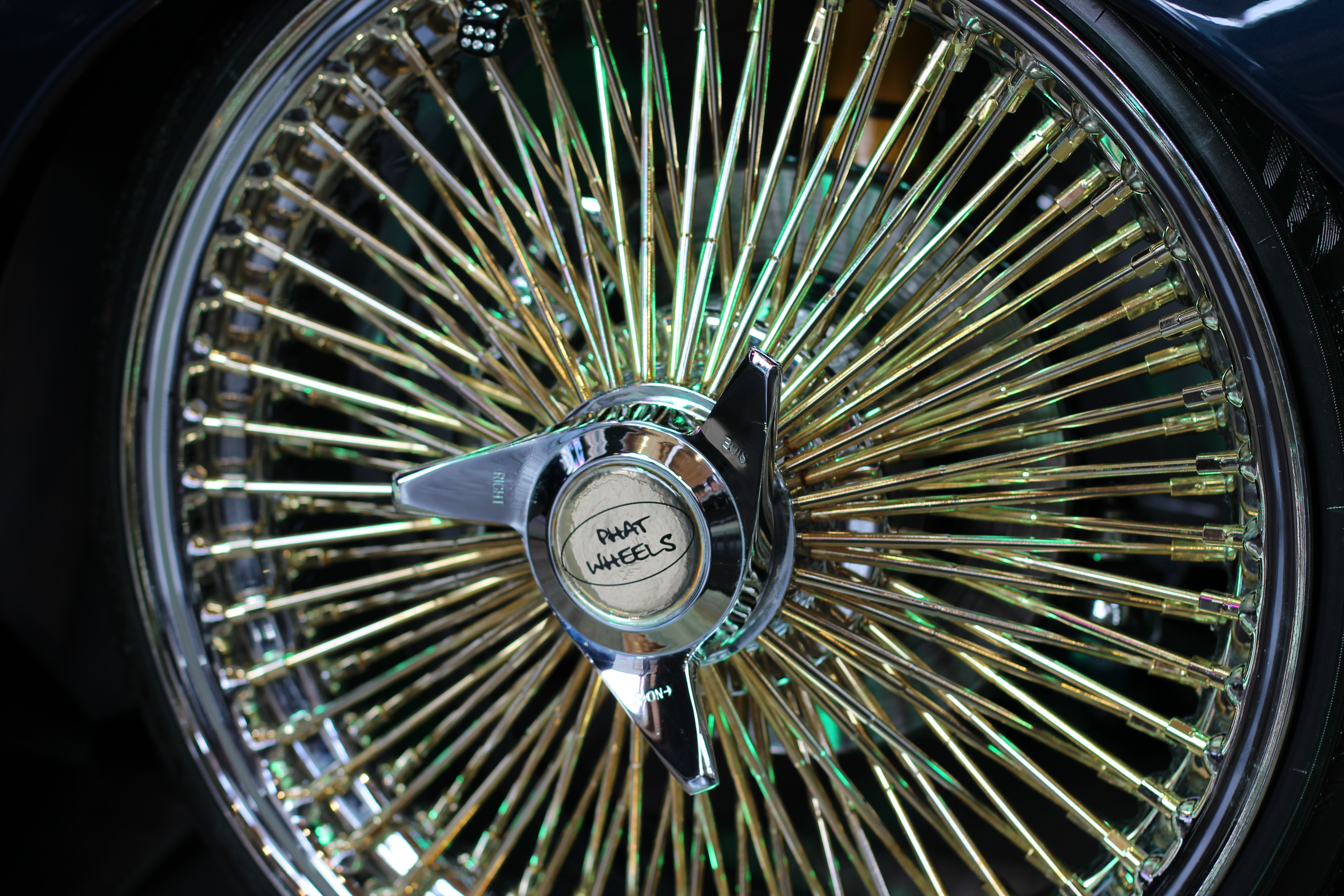 Speichenfelge auf der Tuning World Bodensee 2014 mit Zentralverschluss